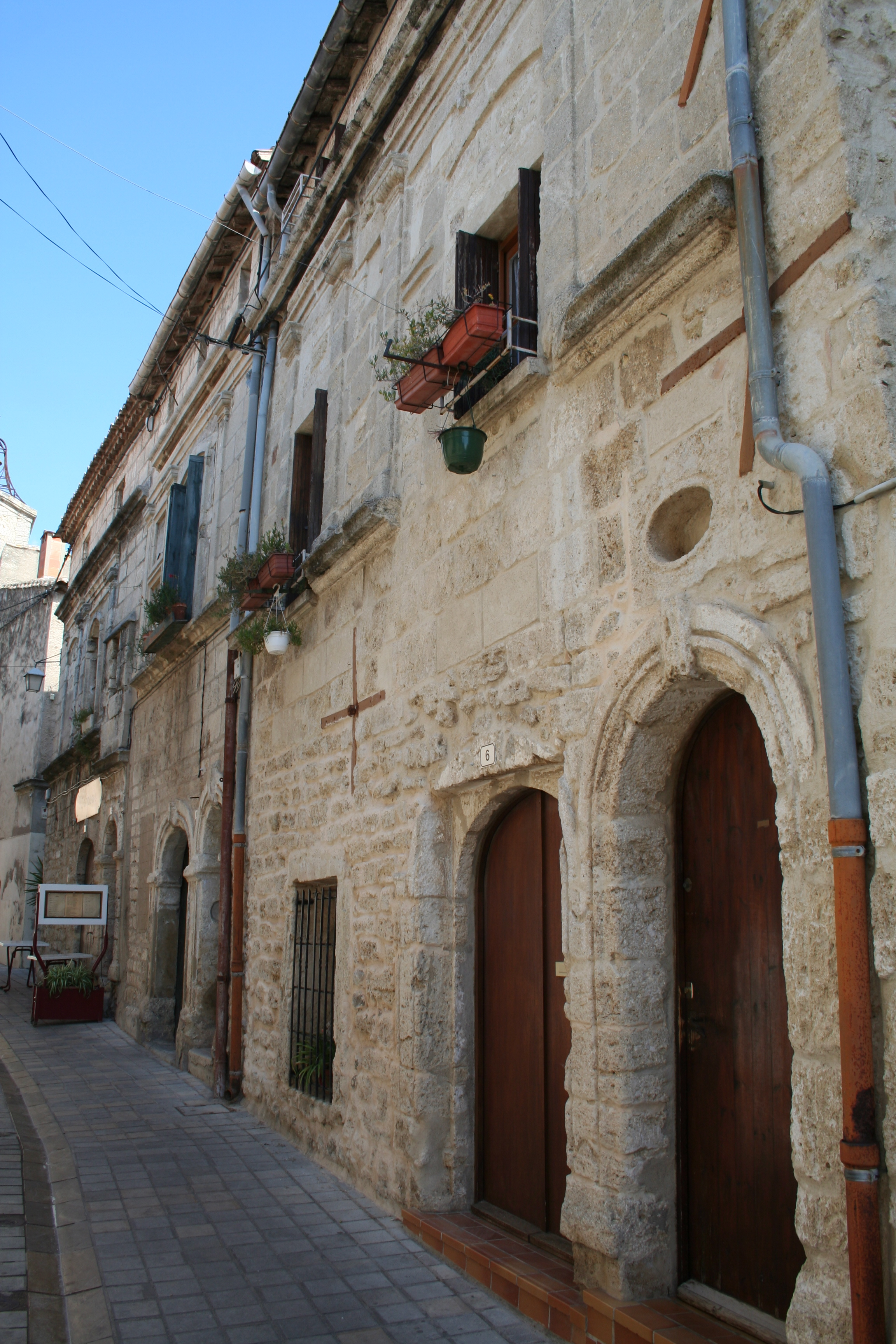 Vic-la-Gardiole (Hérault)- ancienne maison